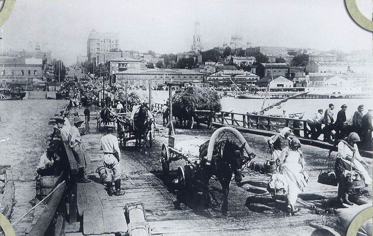 Старый Ростов-на-Дону. Вид на мост